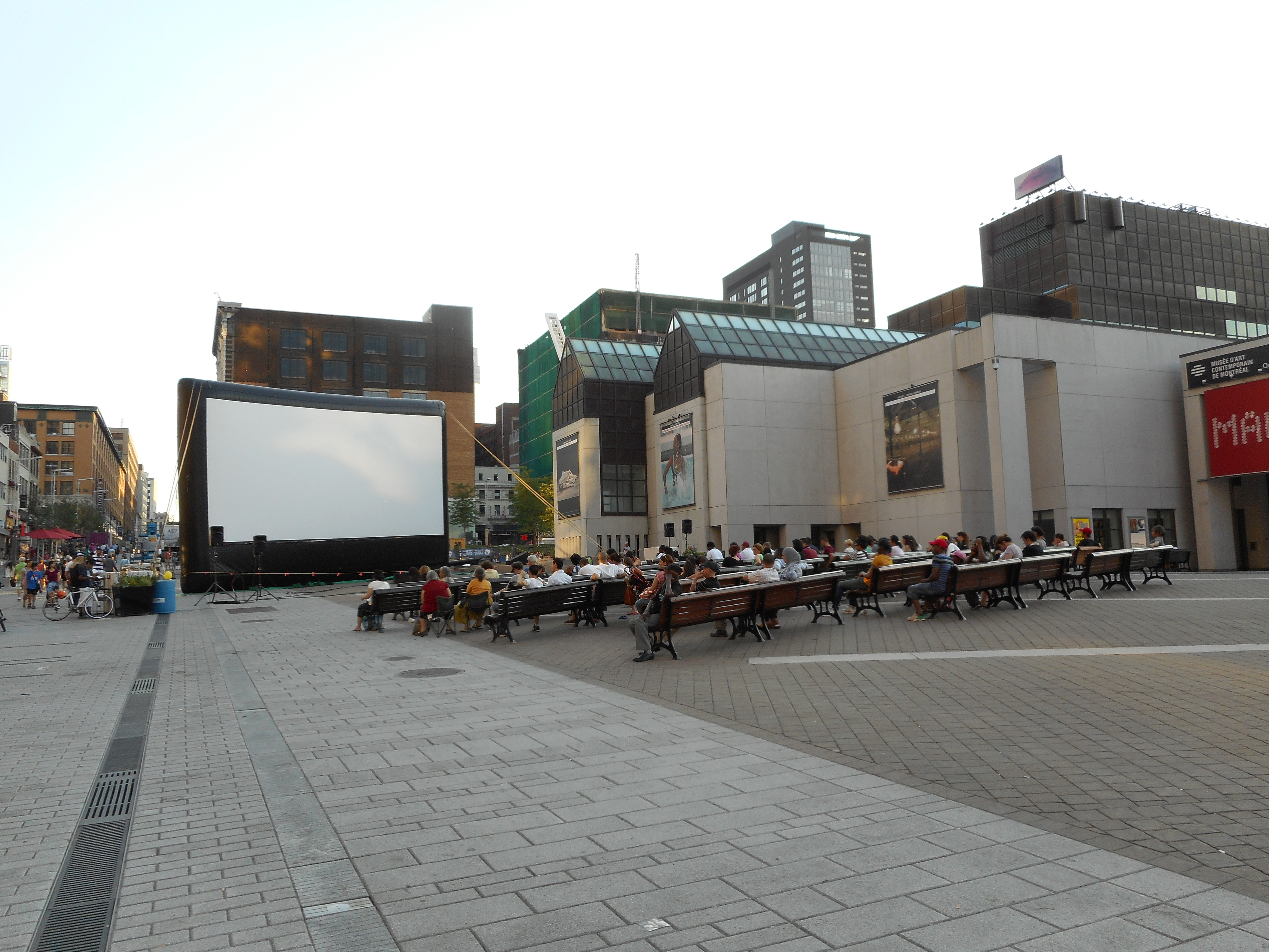 Festival des films du Monde, place des Arts, Montréal